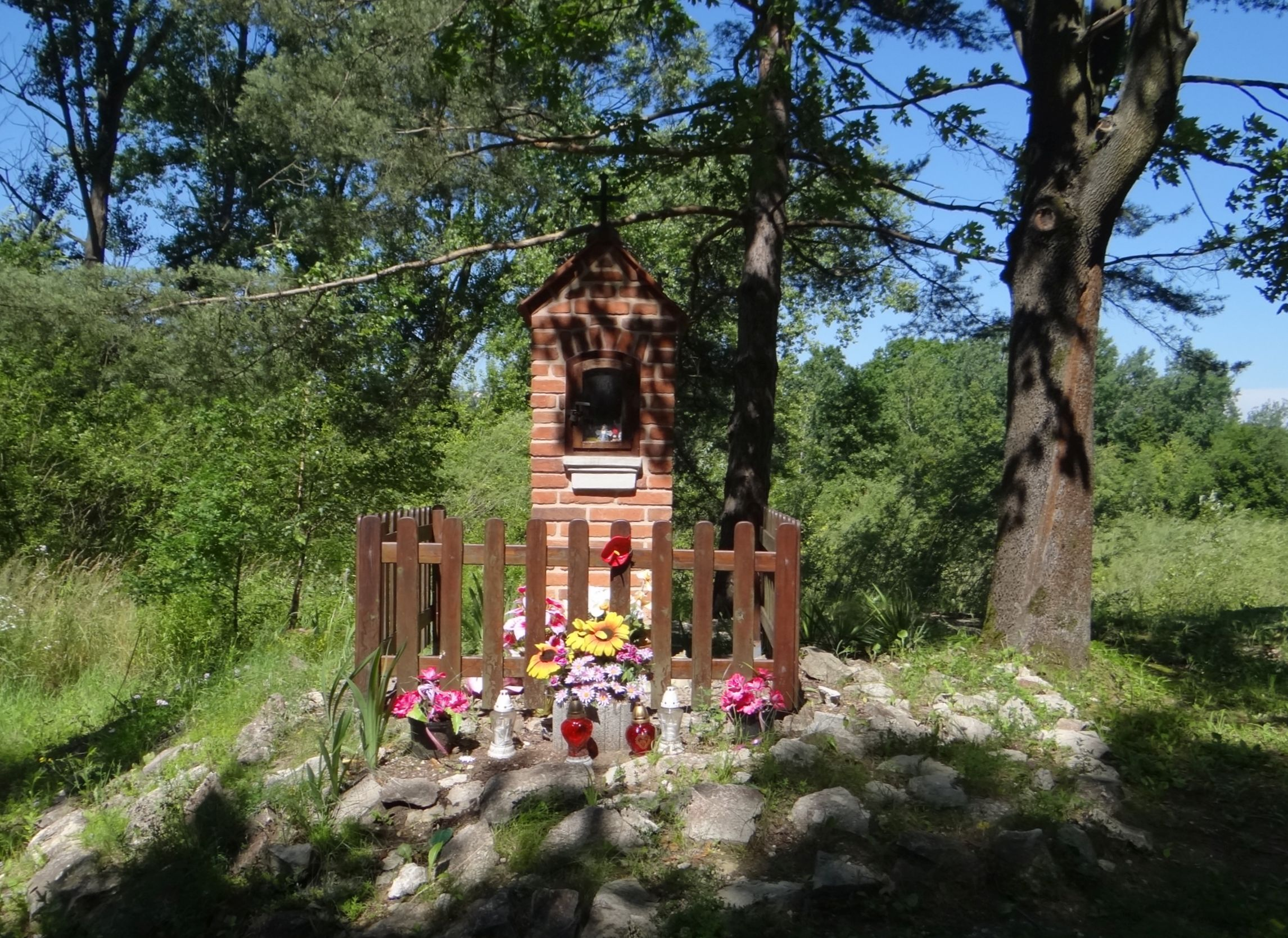 Figurka w miejscowości Młynka